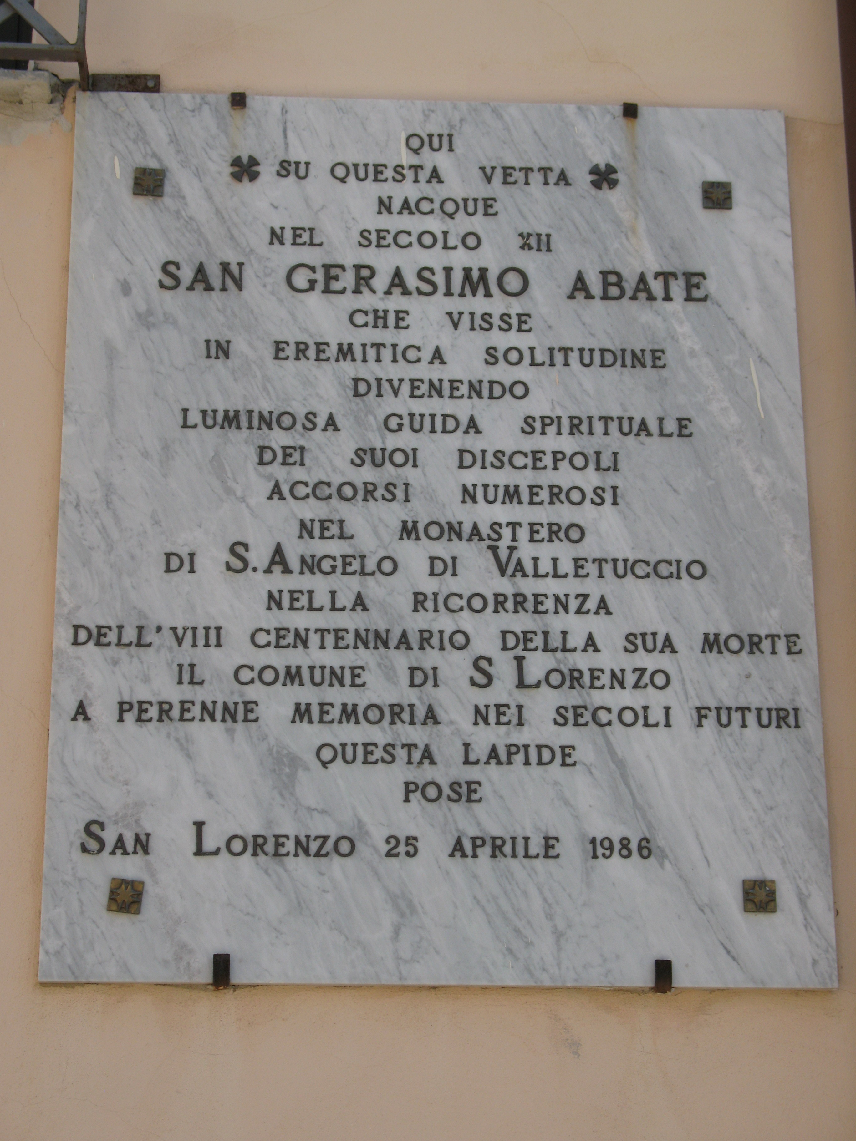 San Lorenzo, lapide a San Gerasimo abate.